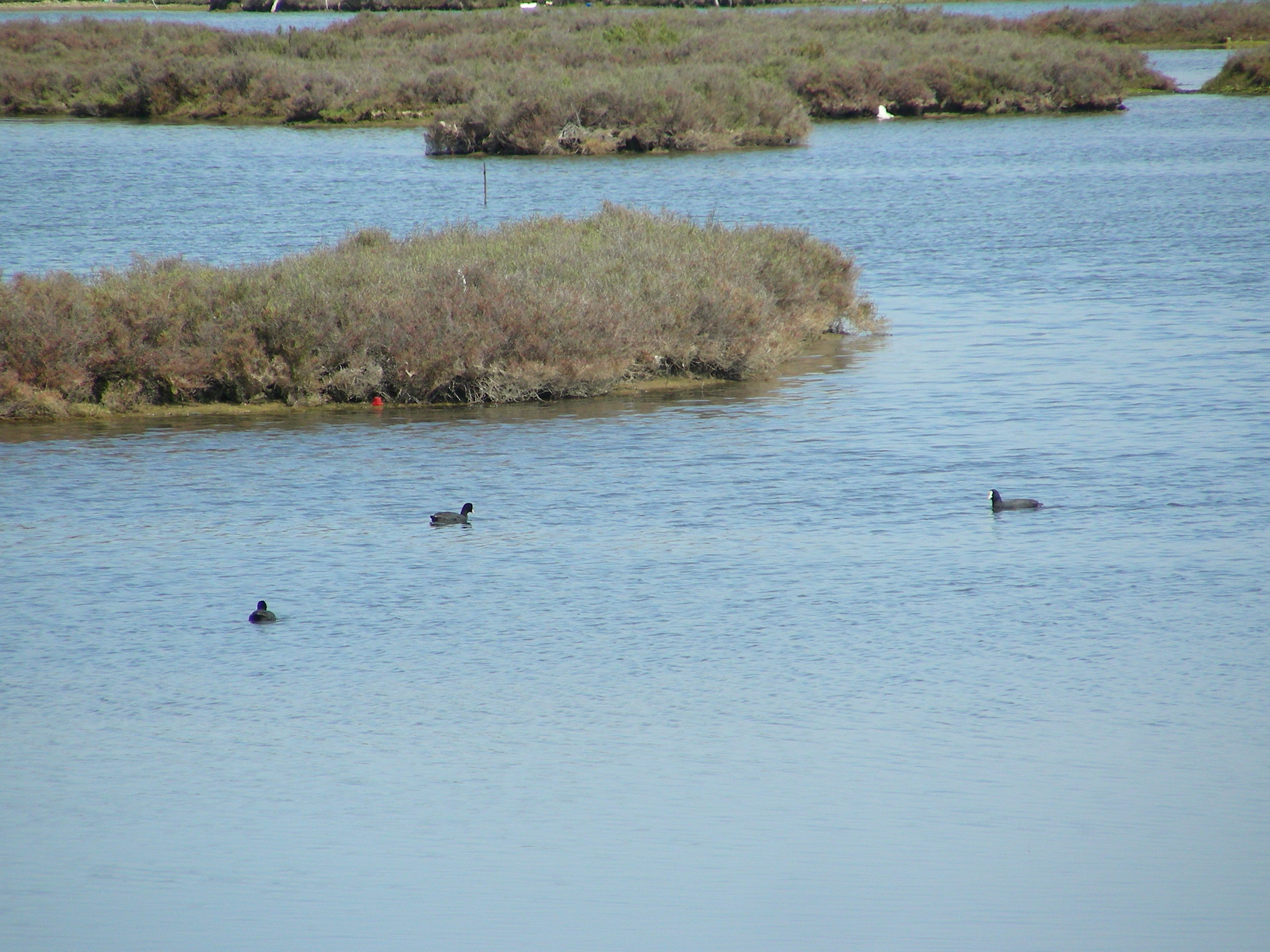 marismas de Isla Cristina, patos